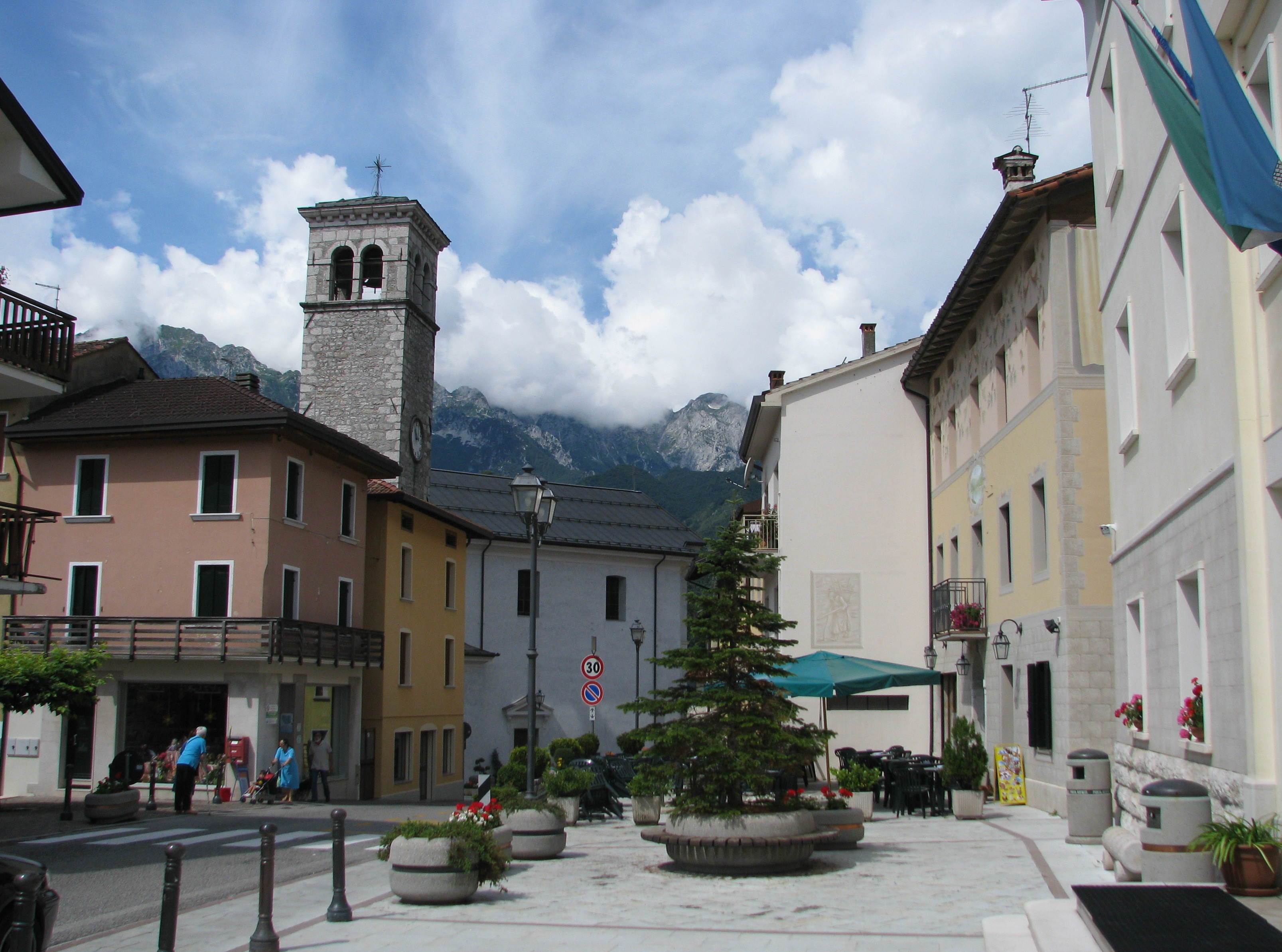 Veduta del centro di Barcis